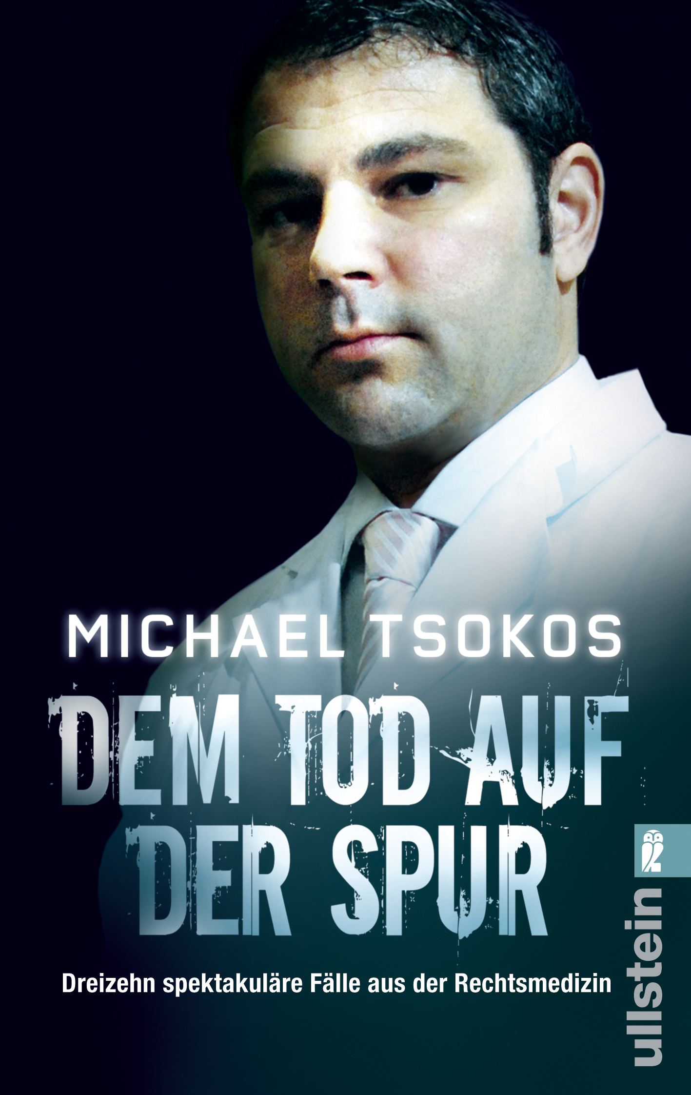 Buchcover Michael Tsokos